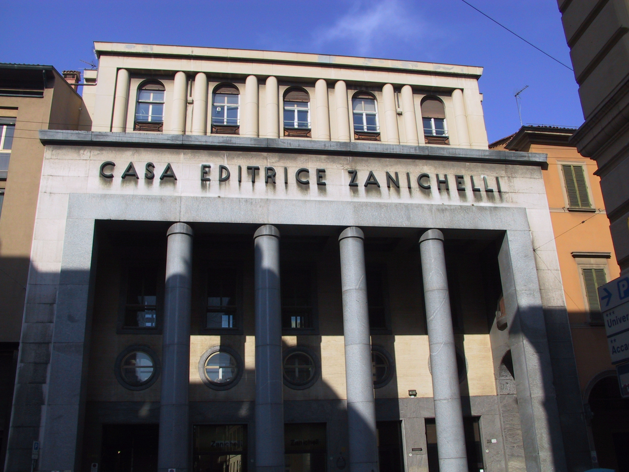 Casa Editrice Zanichelli, Bologna, Italy